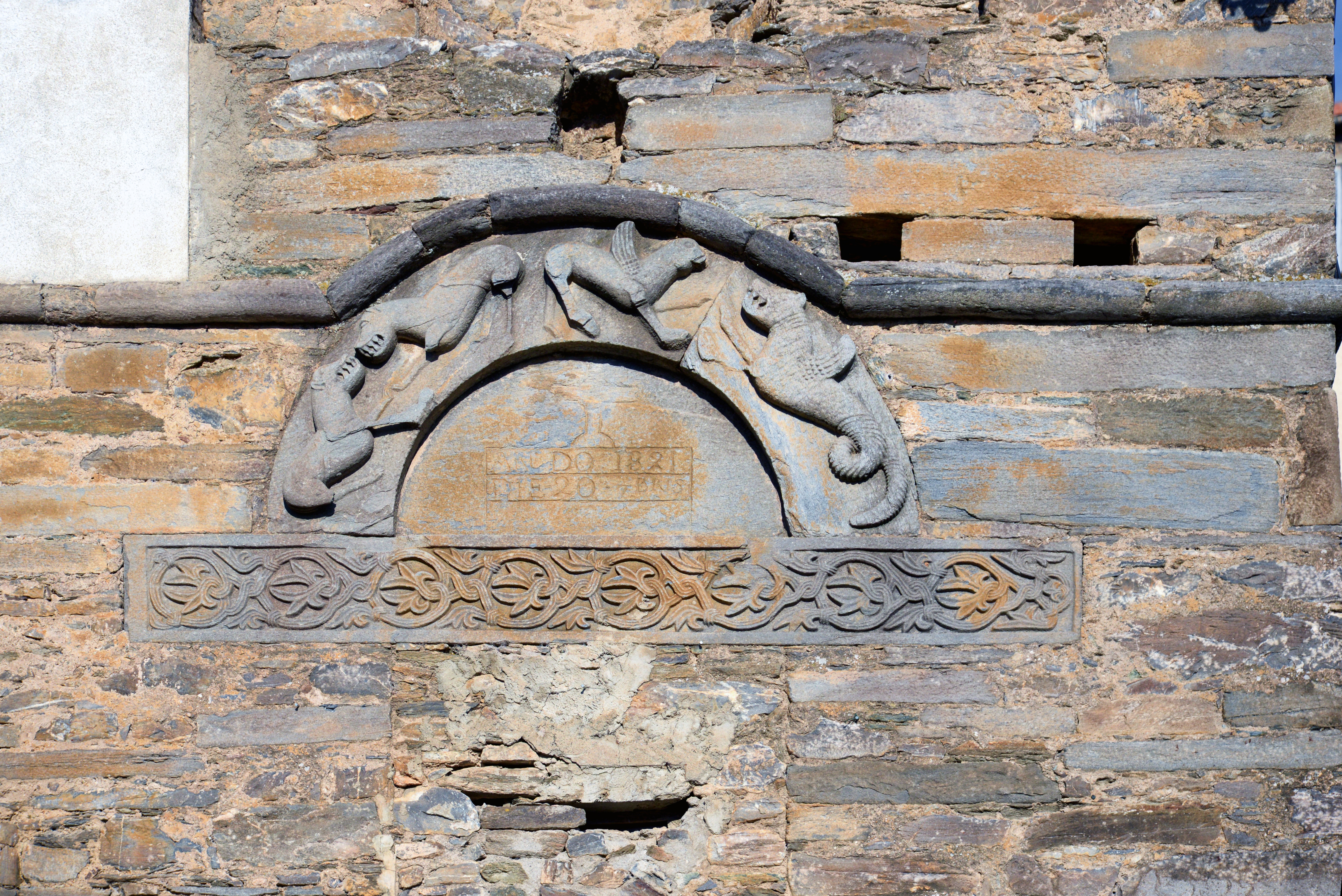 Piedicorte-di-Gaggio, Rogna (Corse) - Bas-relief provenant d'une ancienne église pisane incorporé au clocher (classé Monument historique) de l'église Notre-Dame de l'Assomption du XIXe siècle.